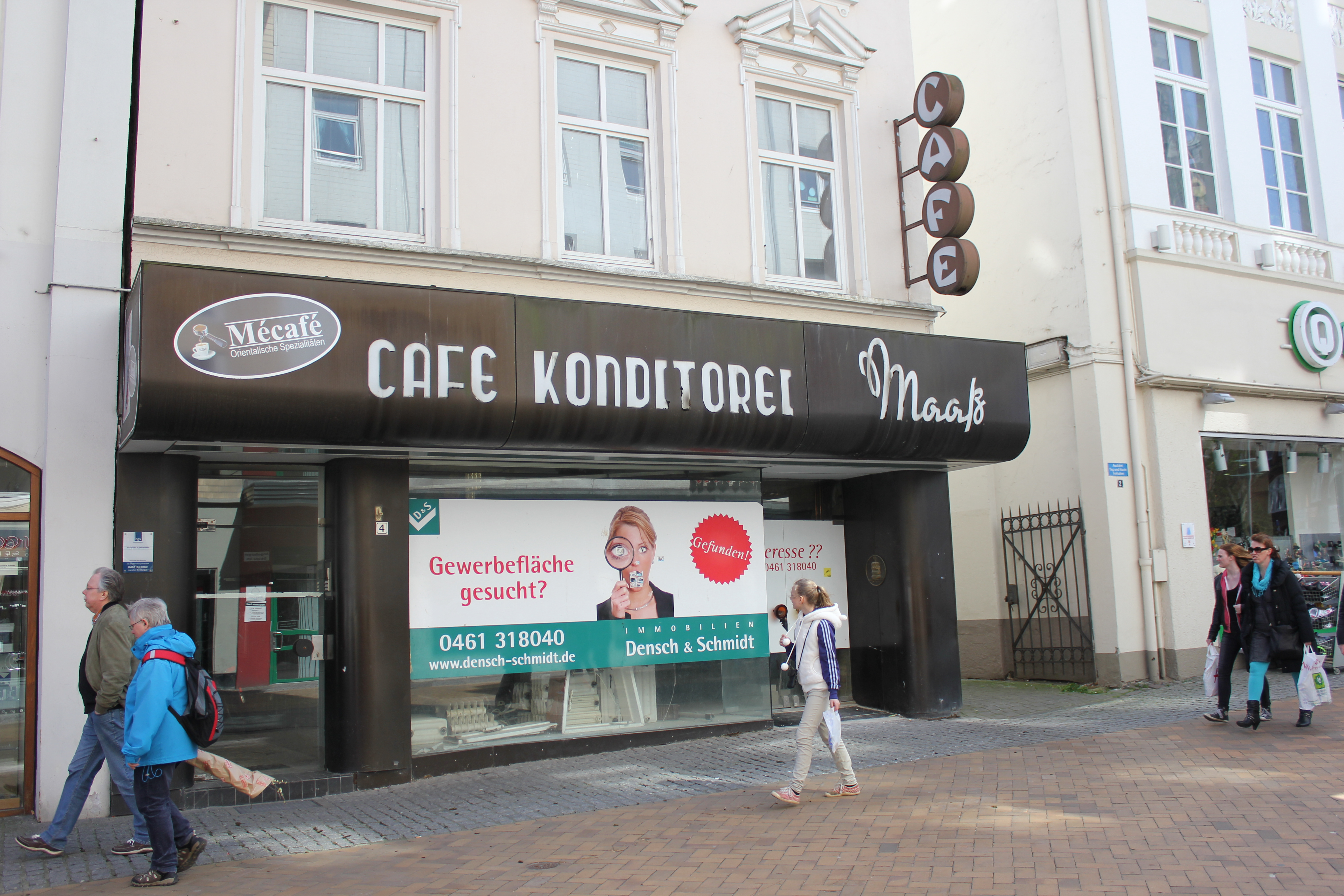 Café Maaß, Flensburgs älteste Konditorei von 1871 (Angelburger Straße 4, Flensburg 2014), Bild 004; Schloß wohl zwischen 2004 und 2011